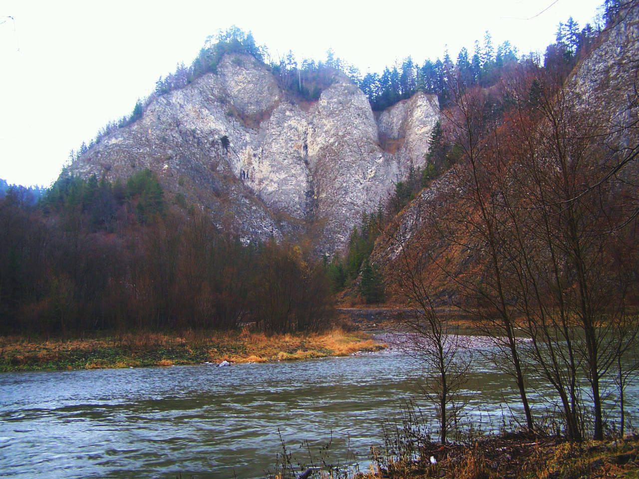 Wylizana (Pieniny)